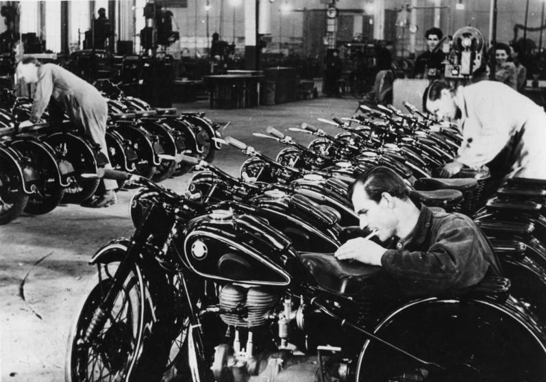 ADN-ZB/Illus-dpd EINE NEUE 250ccm FÜR DM 1.760,-- Das erste BMW-Motorrad vom Typ 24 wurde am 18-12-48 der Öffentlichkeit übergeben und unter den Betriebsangehörigen des Werkes verlost. Das Rad besitzt einen 250ccm-Viertakt-Motor von 12 PS Leistung, Vierganggetriebe, Teleskopgabel und Kardanantrieb. In der jetzt anlaufenden Serienherstellung beträgt der Preis DM 1.760,--. Unser Bild zeigt die ersten BMW-Motorräder vom Typ 24 fertig zum Verkauf. Herausgabe: 20.12.48, 2611-48